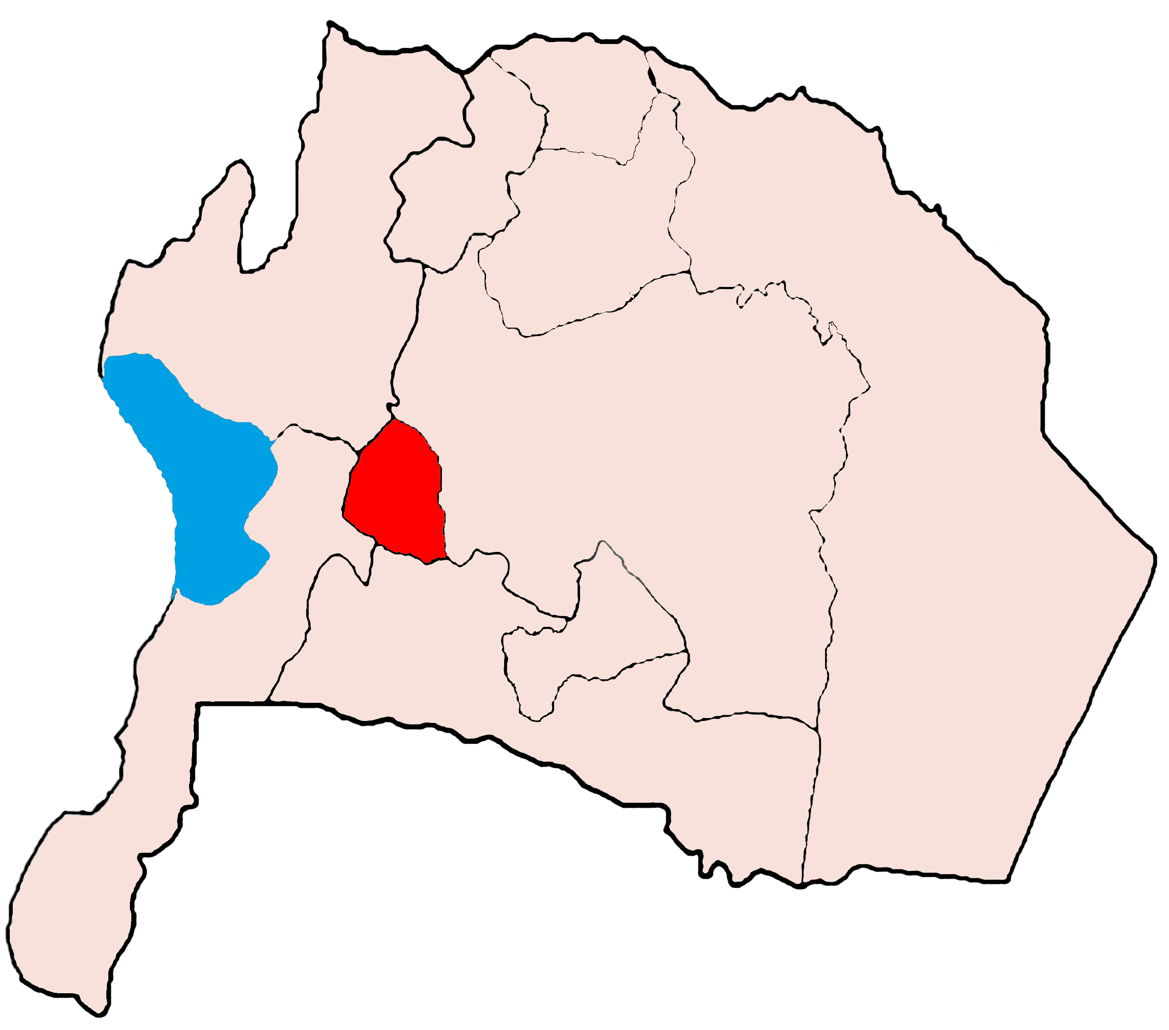 Maps of Karak — Karak-Aii User:Tarawneh/rami